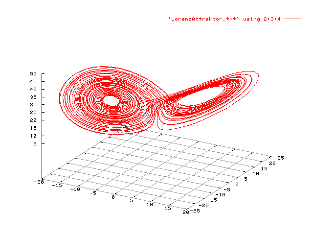 Lorenzattraktor, numerische Simulation